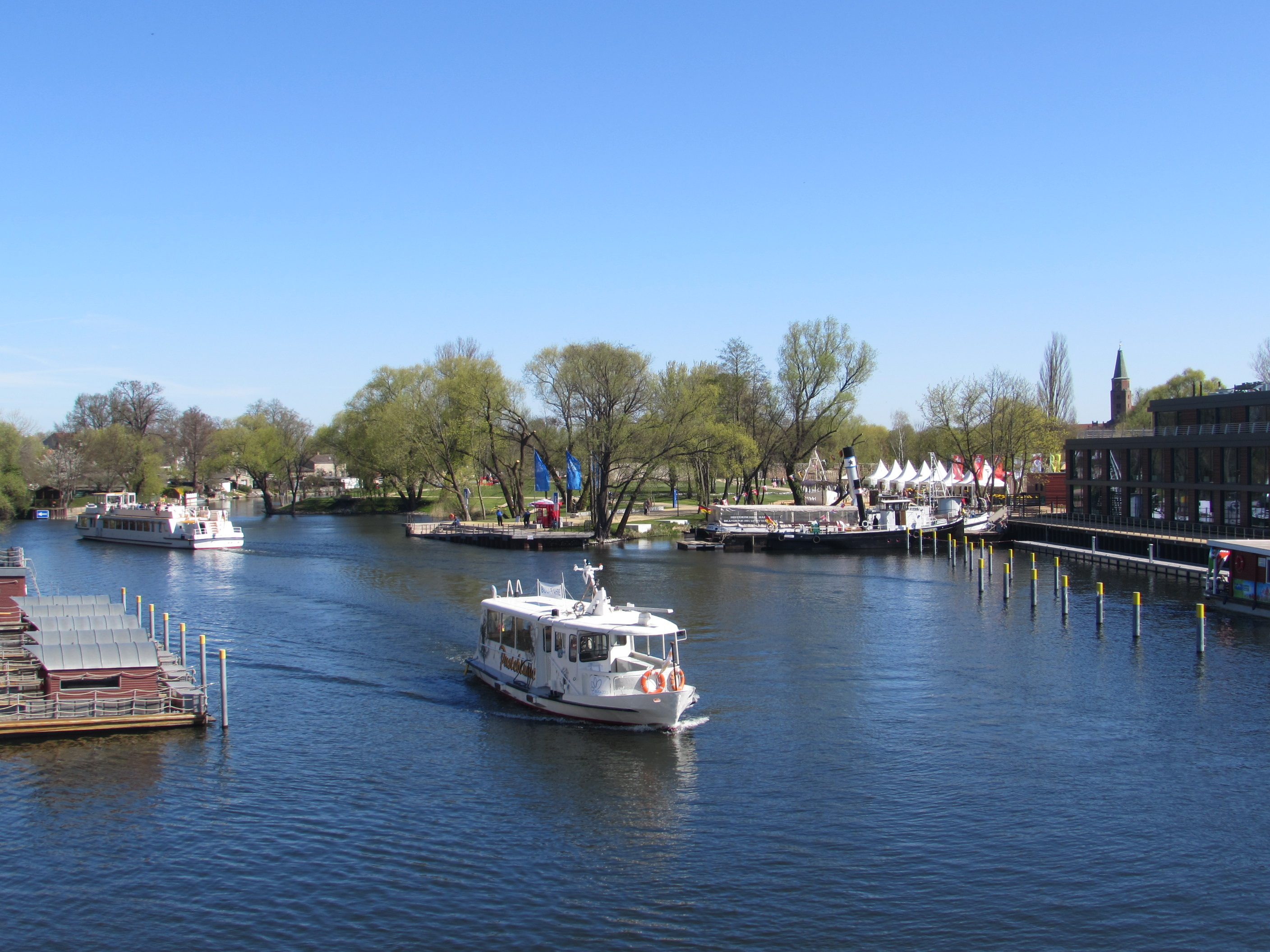 die havel in brandenburg an der havel, rechts im hintergrund das bundesgartenschaugelände packhof; sichbar die schiffe pusteblume, nordstern, pegasus